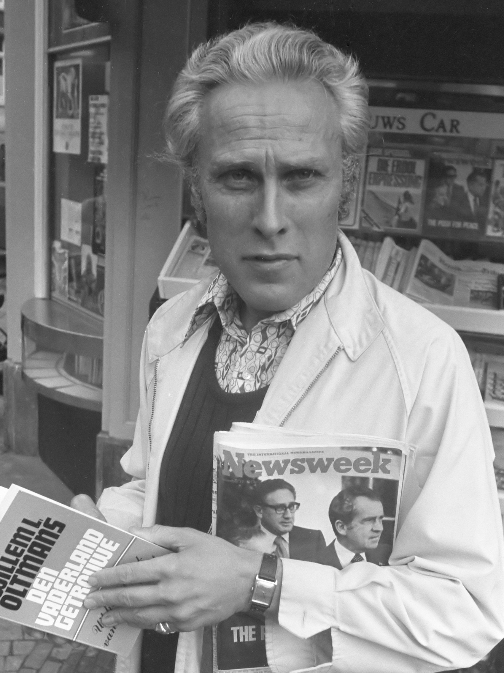 Willem Oltmans met zijn nieuwe boek Den Vaderland Getrouwe 12 november 1973